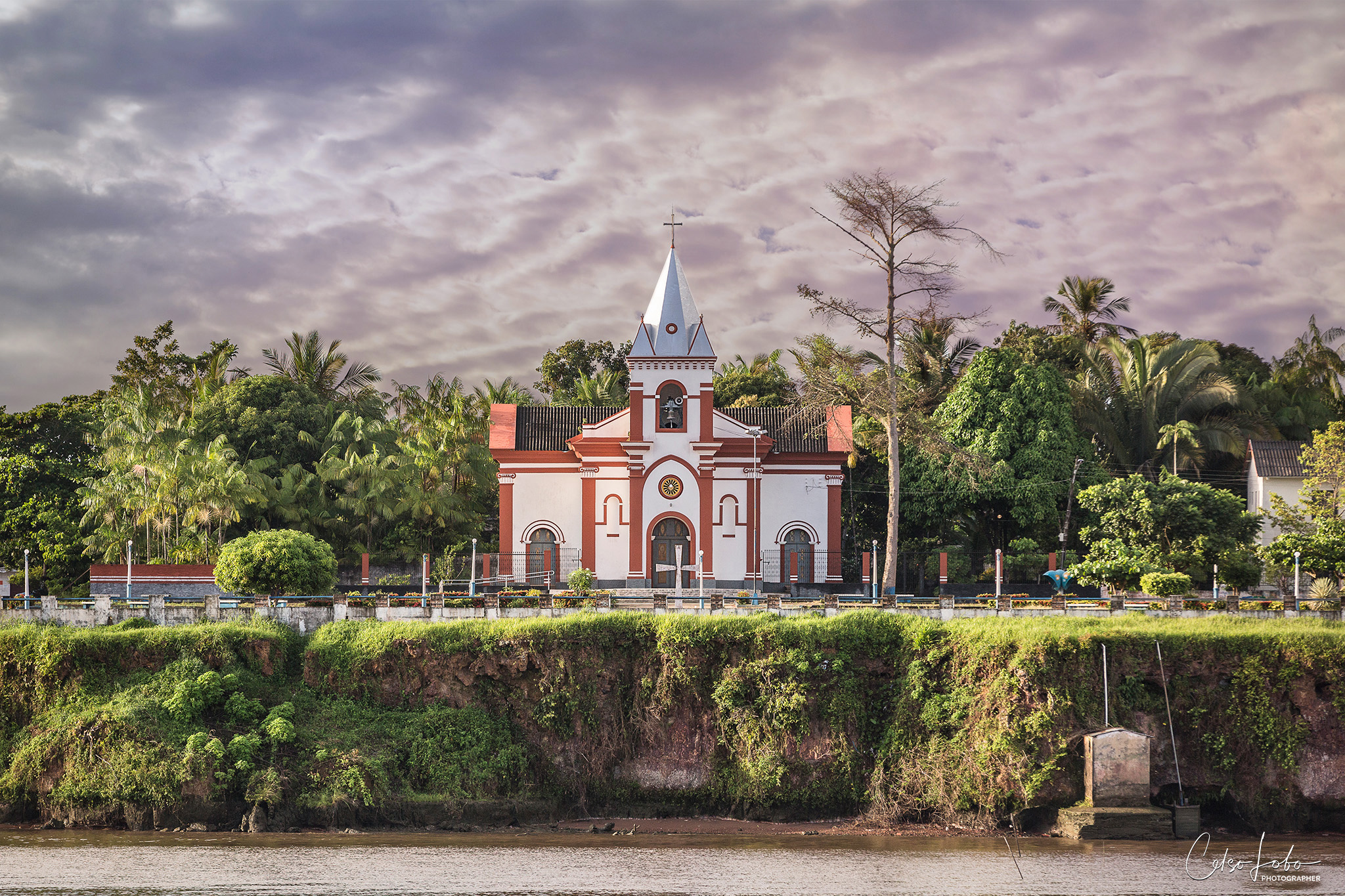 Igreja de Santo Antonio